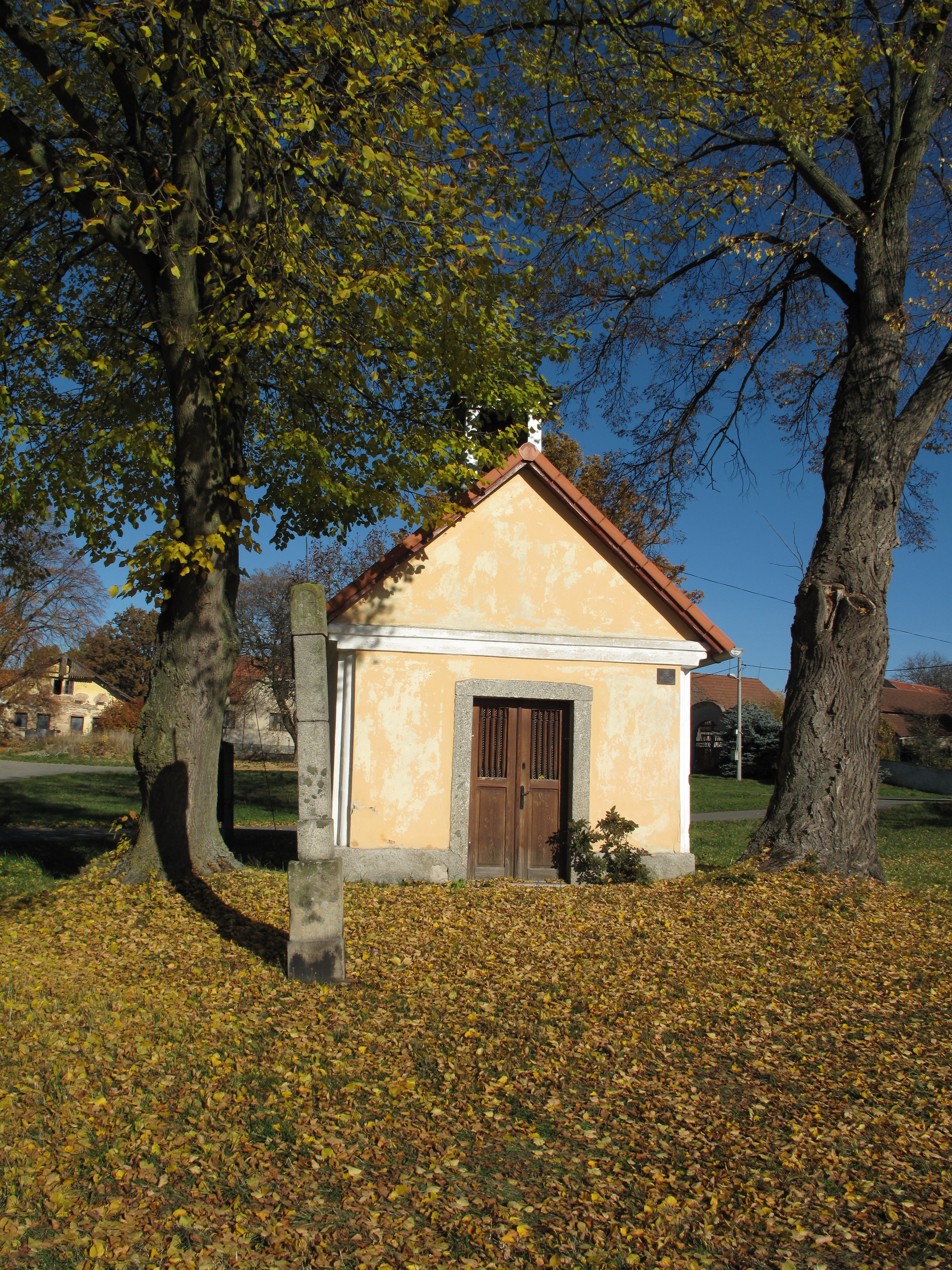 Kaplička v Mýšlovicích. Okres Příbram, Česká republika.